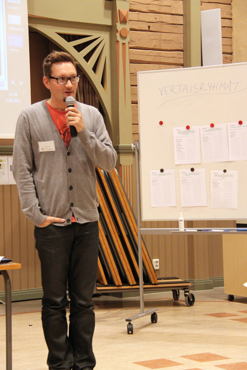 Jarno Paalasmaa pitämässä puhetta lapsen ihmisnäkemyksestä.